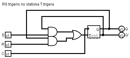 RStoD